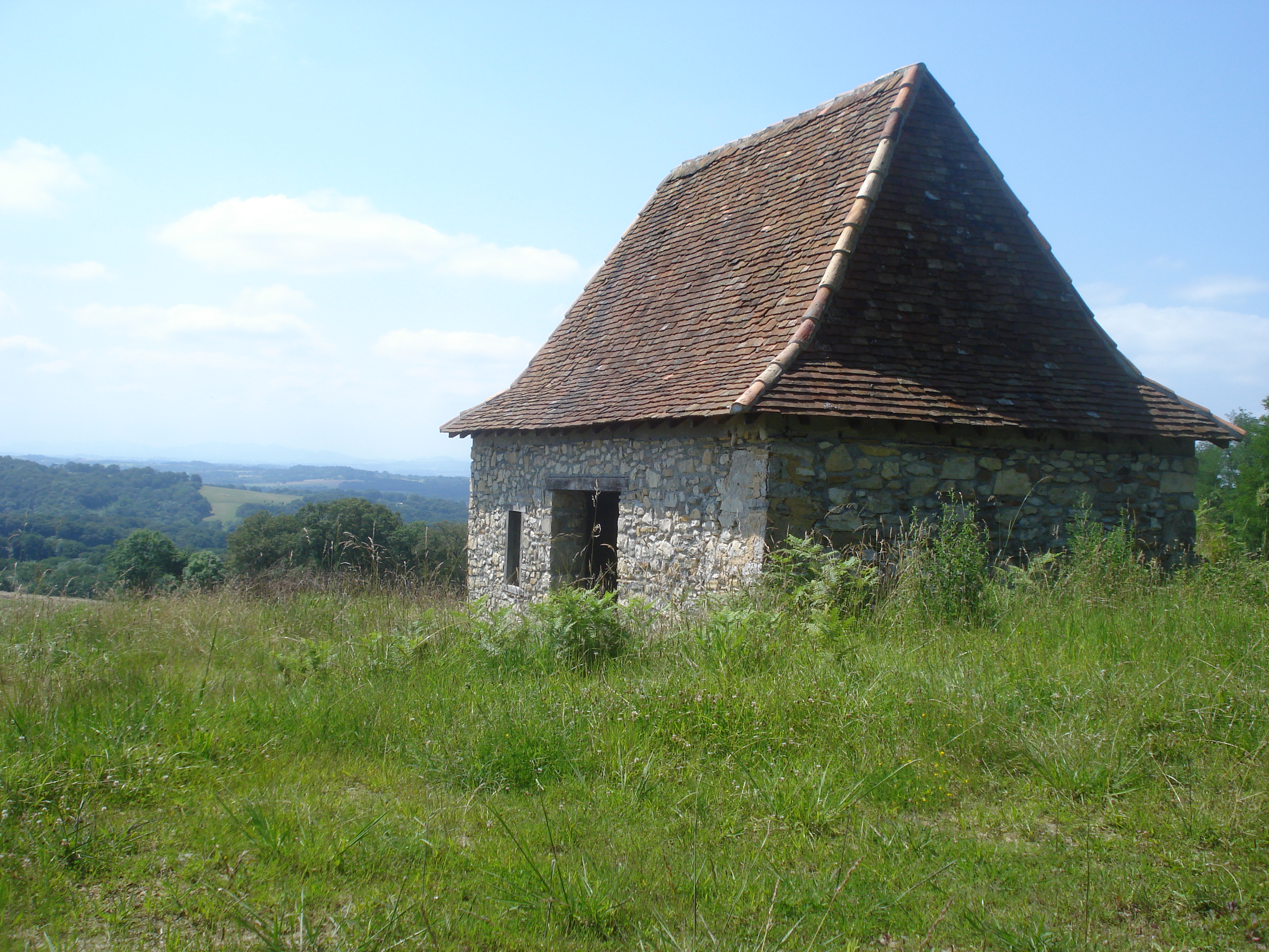 Andrein (Pyr-Atl, Fr) Paysage au-dessus d'Andrein et de la vallée de la Gave d'Oloron.